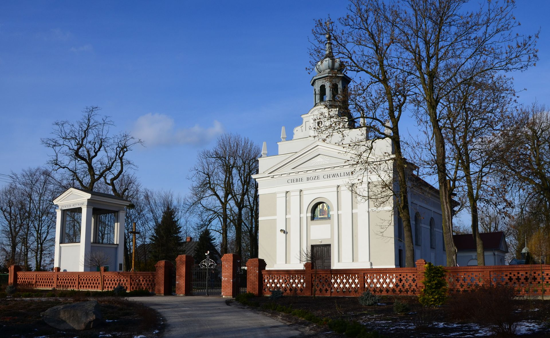 Mikołajew, zespół kościoła par. pw. św. św. Jana i Pawła, 1815-1821